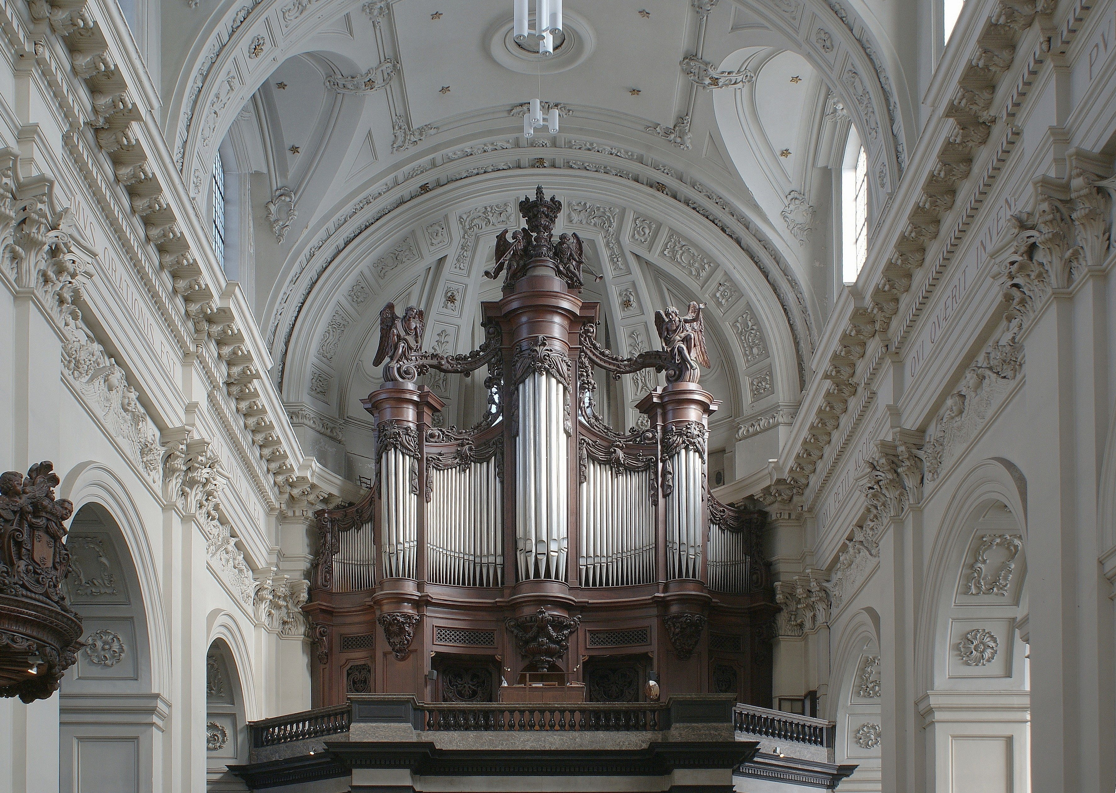 Cathédrale de St-Aubain (Namur) - Orgue de Korfmacher; sculptures faites par Charles Geerts